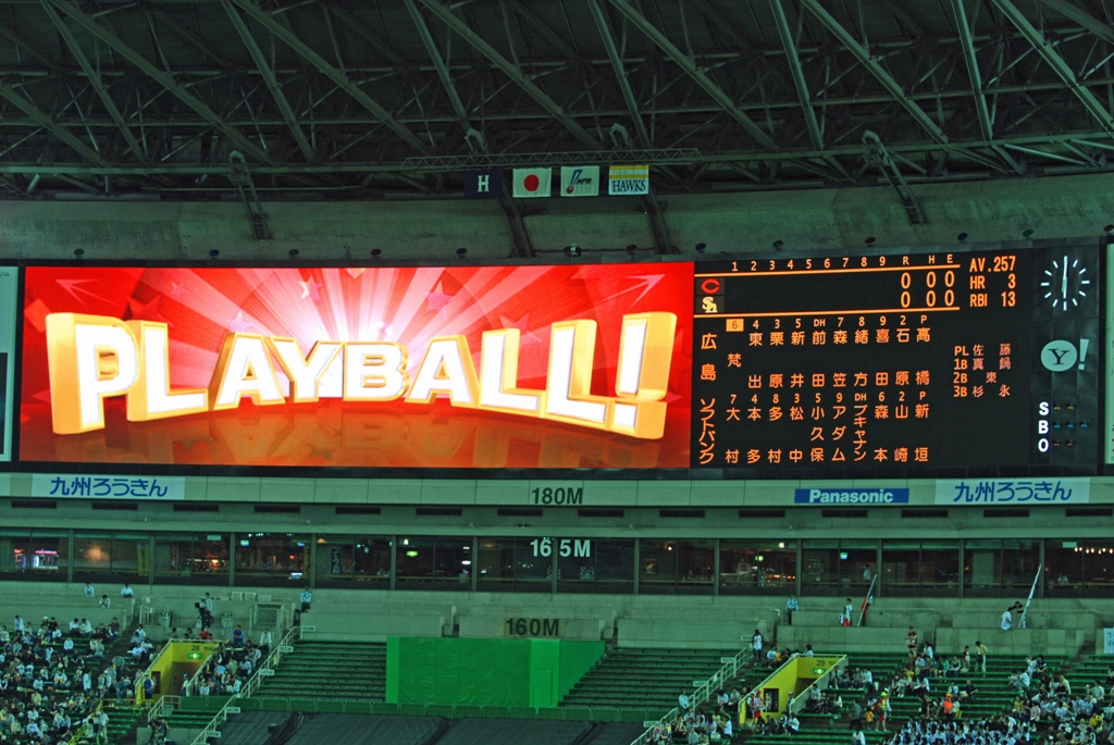 福岡ドームのスコアボード。2007年5月25日の福岡ソフトバンクvs広島の試合のプレイボール時のもの。投稿者(Kltdexp)自身が撮影。 2007年6月7日 (木) 22:40 . . Kltdexp . . 1024×685 (522 キロバイト)